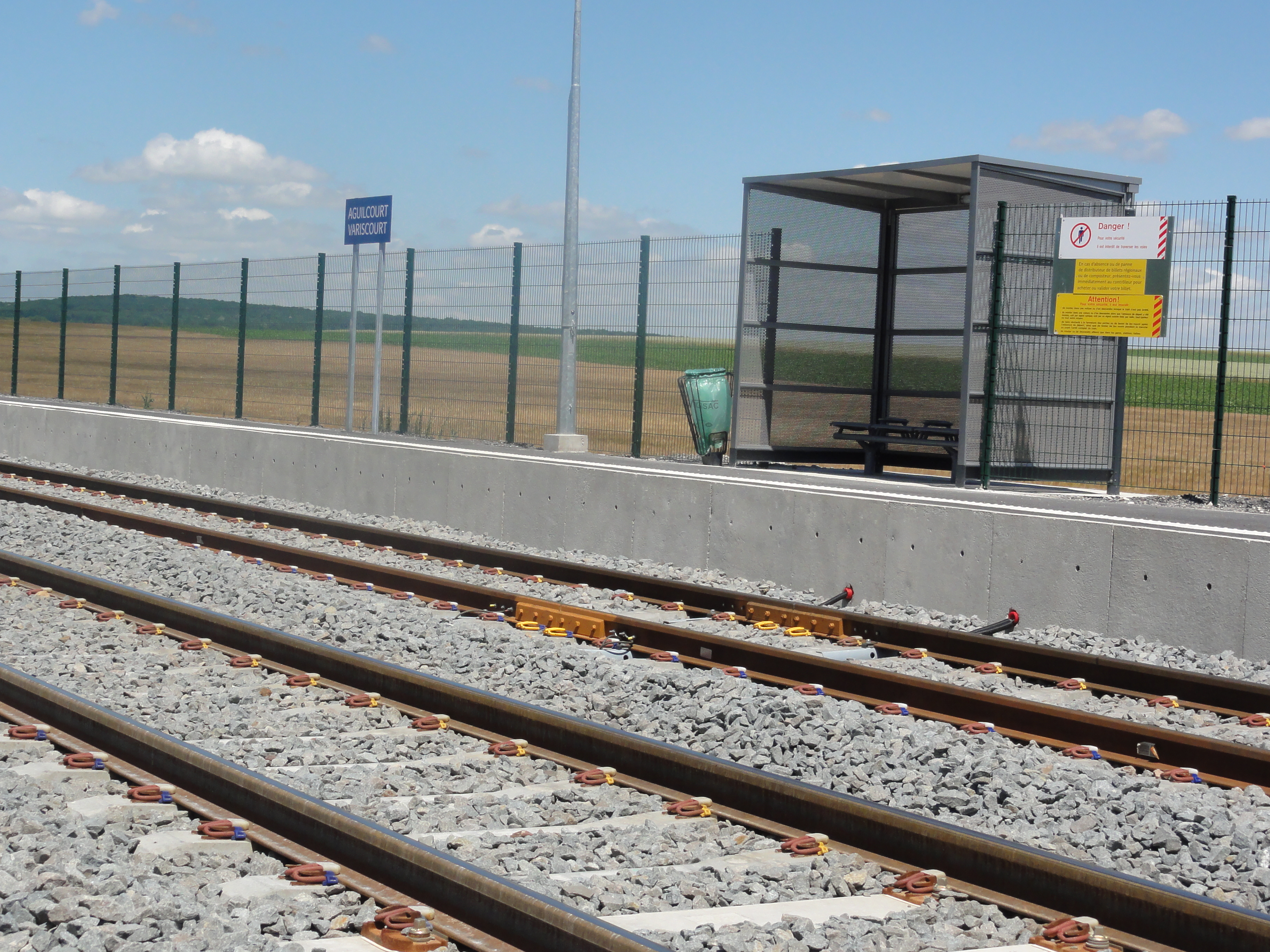 Variscourt (Aisne) gare d'Agilcourt-Variscourt